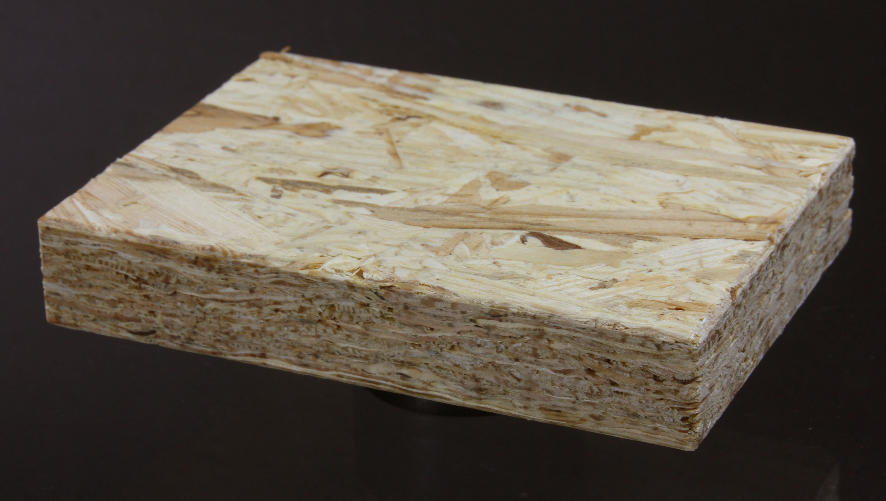 OSB/3 Kronoply